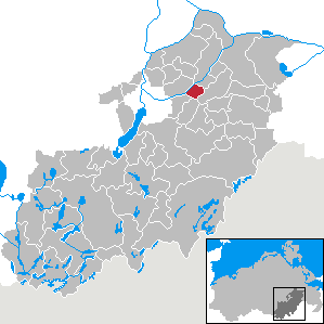 Glienke in Mecklenburg-Vorpommern, Landkreis Mecklenburg-Strelitz